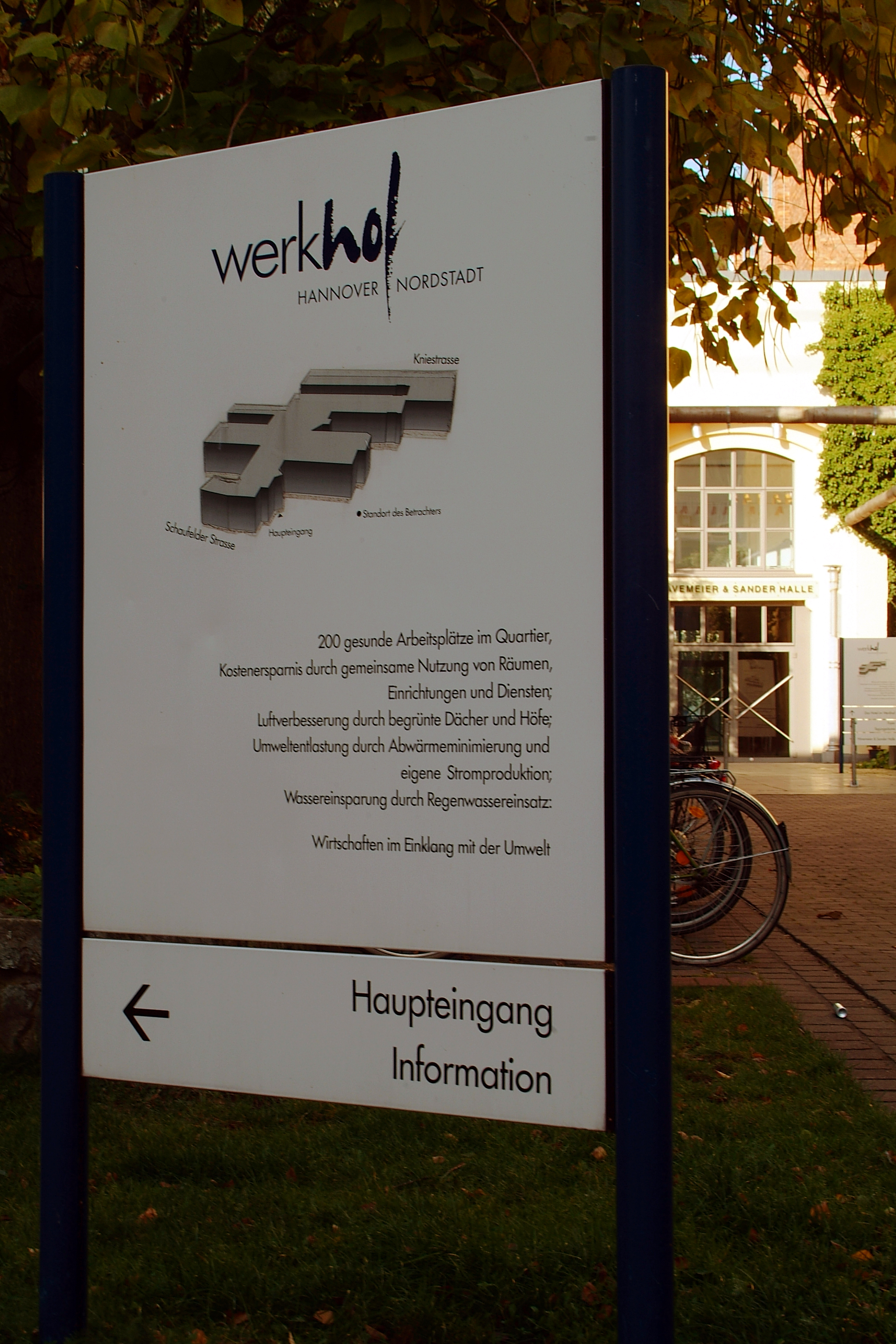 Hinweisschild am Eingang zum Werkhof Hannover in der Schaufelder Straße